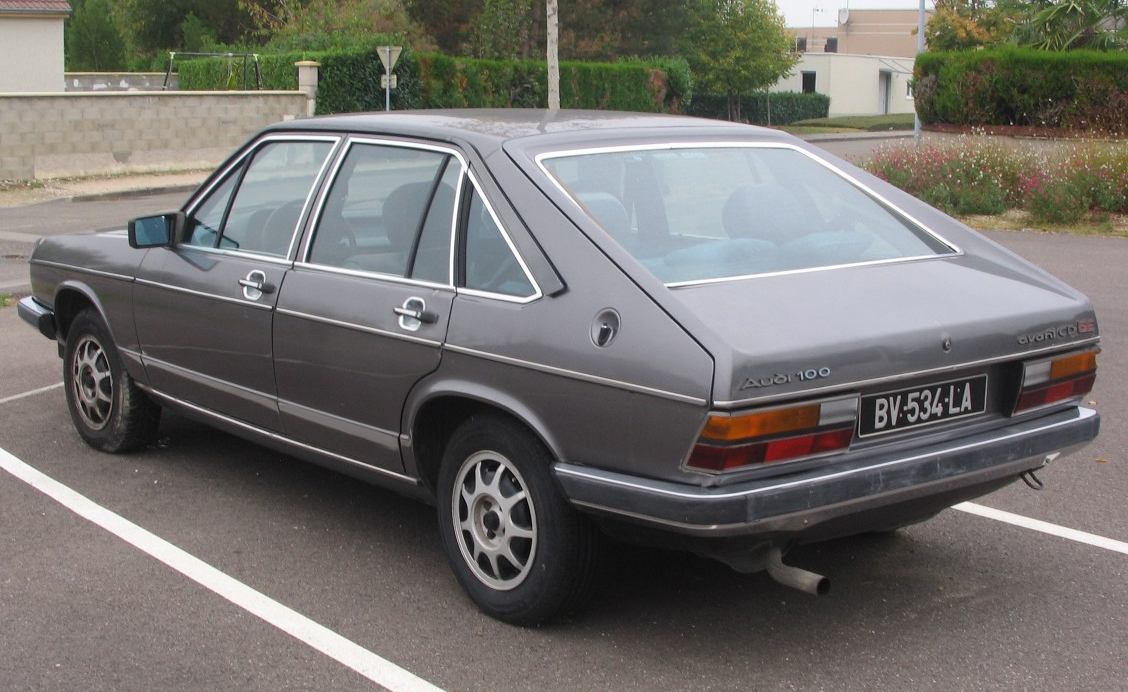 Attention, monument historique en vue ! Cette Audi 100 « C2 » Avant CD 5E bien préservée, comptait un peu moins de 117 500 km au compteur au moment où je l’ai immortalisée... malgré ce faible total on sent que la carrosserie a vécu, comme en atteste le feu AR droit éclaté sur sa hauteur. Le plus remarquable reste l’absence totale, des 2 côtés, de corrosion sur le bas de caisse, chose rarissime pour une voiture de cette époque. Le constructeur d’Ingolstadt montre là toute son expertise en la matière, prenant une longueur d’avance sur ses rivaux... (il fût le 1er à garantir, au cours des années 80, ses carrosseries 12 ans contre la perforation) Petite curiosité concernant l’immatriculation (ici automne 2011), combinant anciennes normes à caractères gris métallisés sur fond noir, au système de numérotation en cours dans l’Hexagone depuis le printemps 2009. Privilège réservé aux véhicules passés carte grise « collection »... Précisions complémentaires: Avant désigne ici une berline bicorps à hayon. Audi reprendra le terme plus tard, pour nommer sa ligne de breaks; CD réfère à une finition huppée, non une motorisation diesel; 5E renvoie lui effectivement au type moteur - - en l’espèce un 5 cyl. en ligne, principale innovation du modèle. Et qui en dépit de ses qualités n’est pas de trop pour mouvoir un engin de 4,68 m particulièrement peu aérodynamique, accusant surtout plus de 1,15 t à vide sur la bascule ! - cylindrée: 2 144 cm3 - puissance maxi: 100 kW @ 4 800 tr/min. - couple maxi: 185 Nm @ 4 200 tr/min. - V max.: 190 km/h